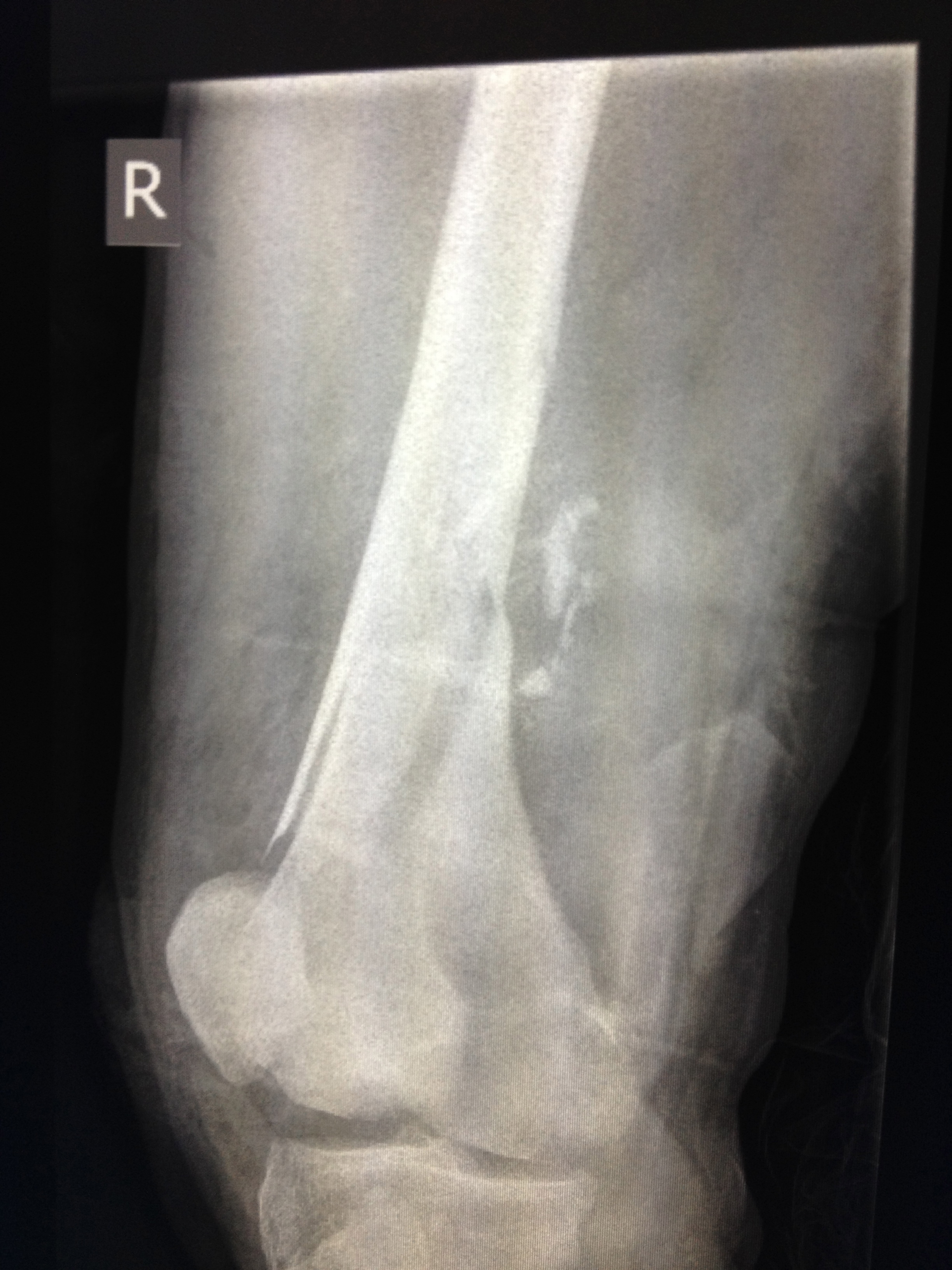 Schussbruch des Oberschenkelknochens. Röntgen seitlich